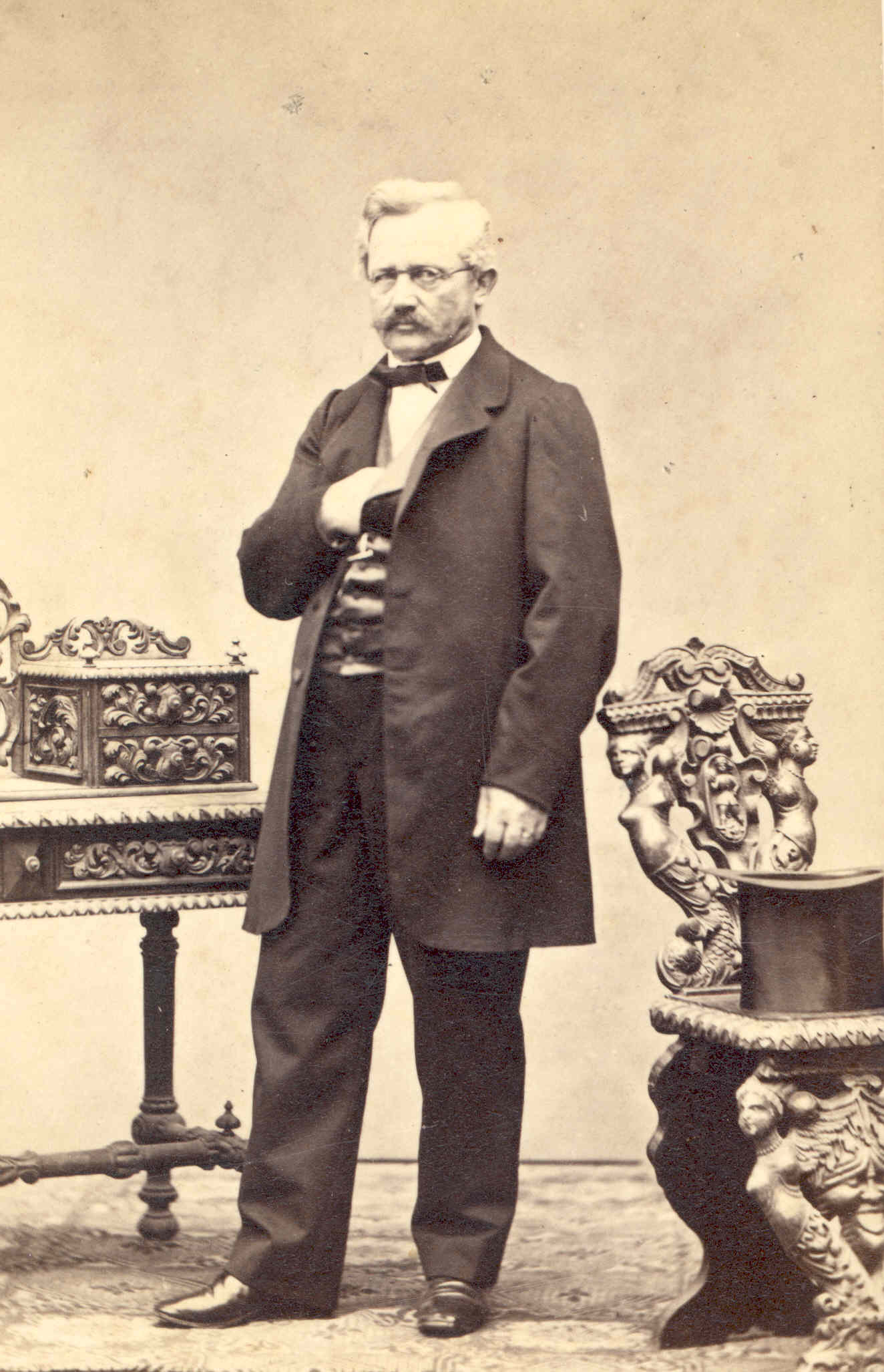 Der Voralrberger Landtags- und Reichsratsabgeordnete Fidel Markus Wohlwend